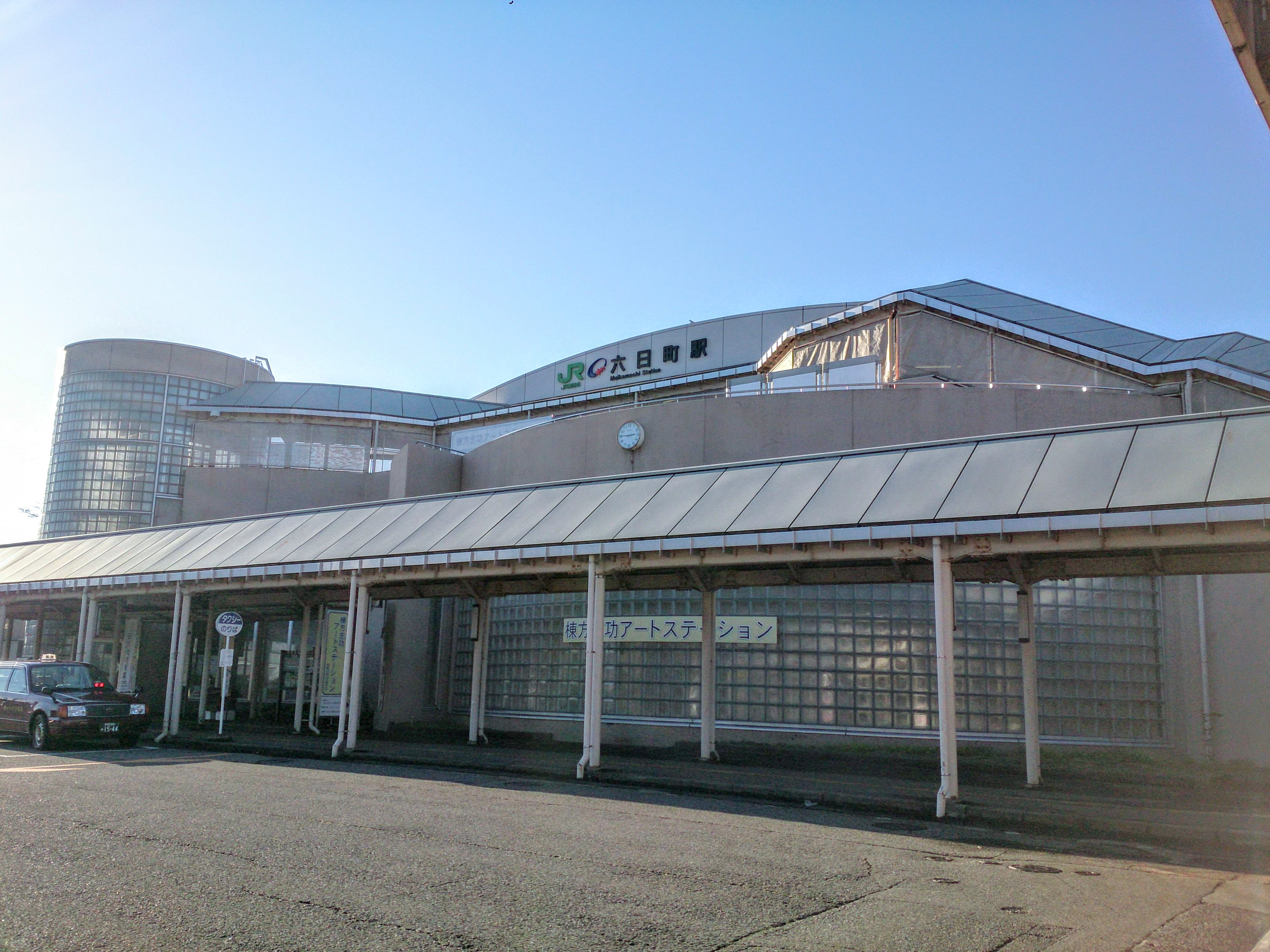 六日町駅の駅舎